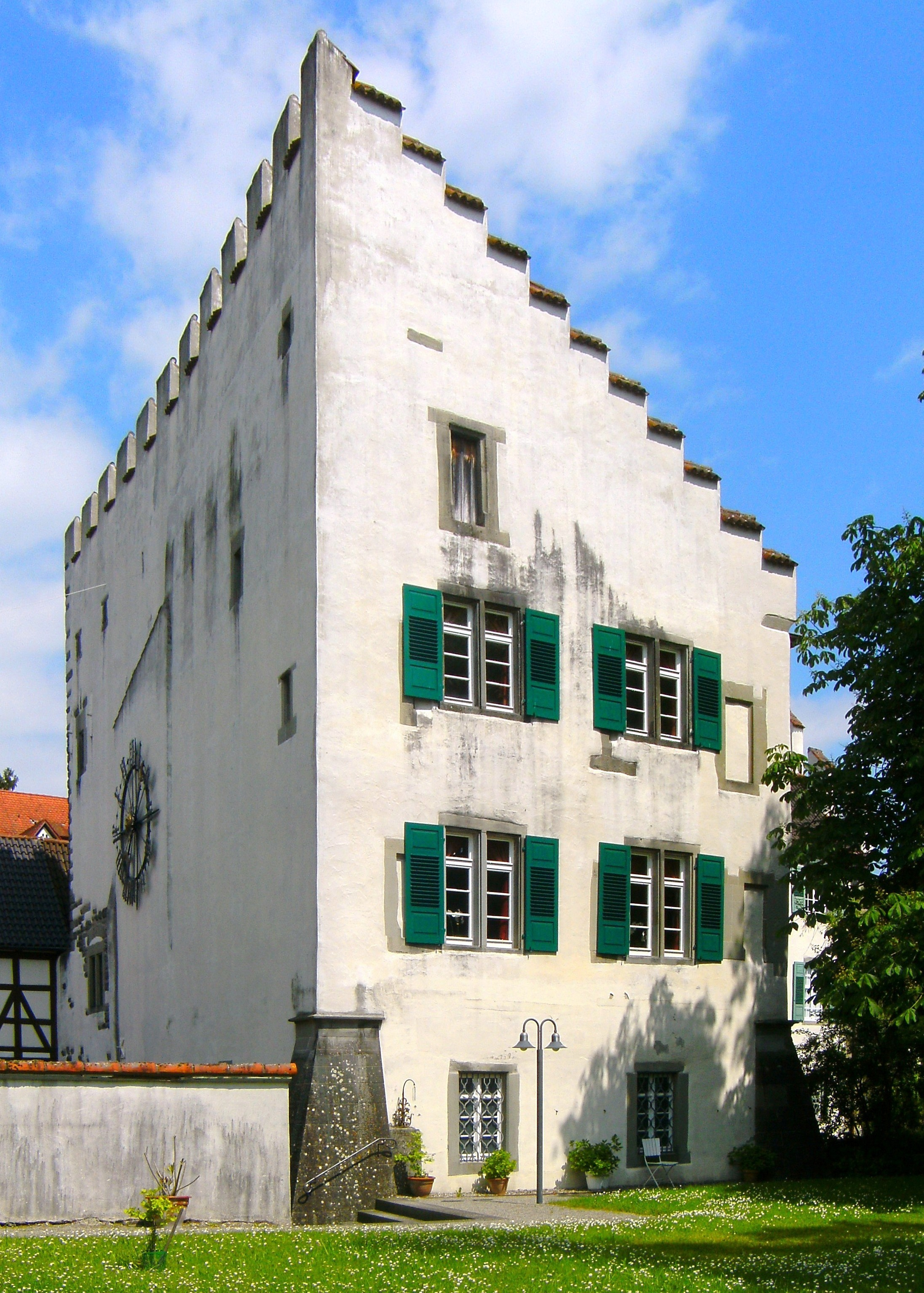 Museum in Überlingen